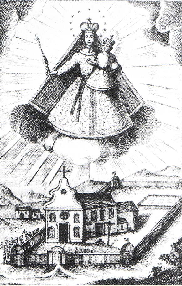 A máriakéméndi kegyszobor és kegytemplom J.F.Binder metszetén,1774.